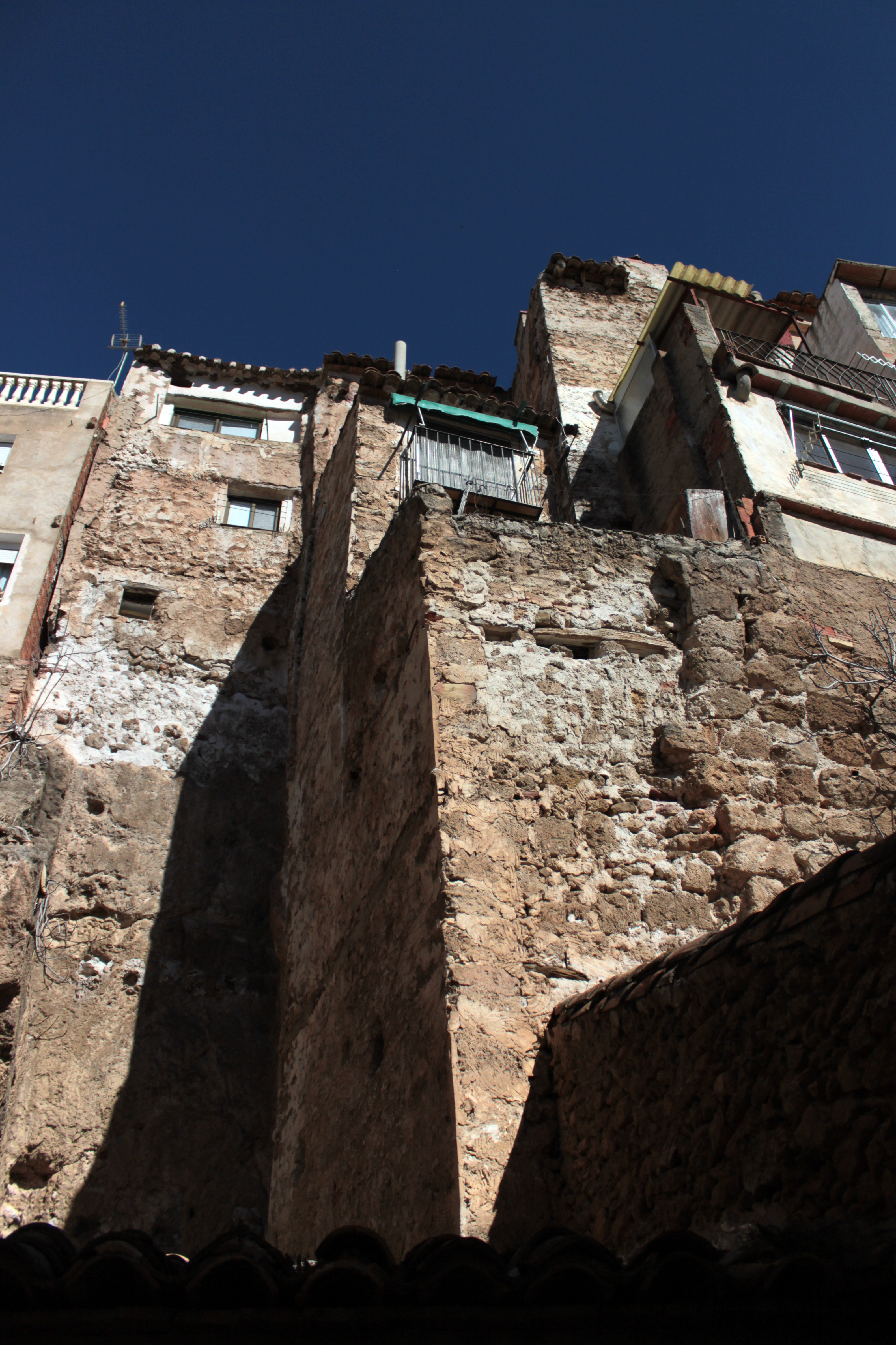 Restos de los torreones del antiguo castillo en los muros de viviendas actuales de Chelva, provincia de Valencia, Comunidad valenciana, España.